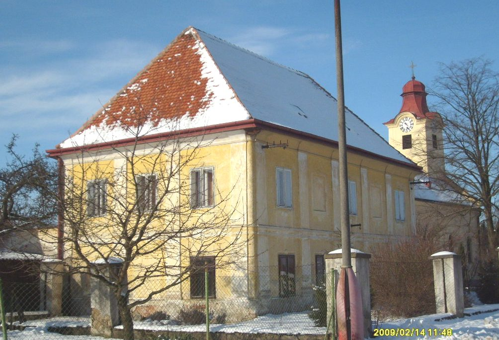 Fara ve Dvorech nad Lužnicí